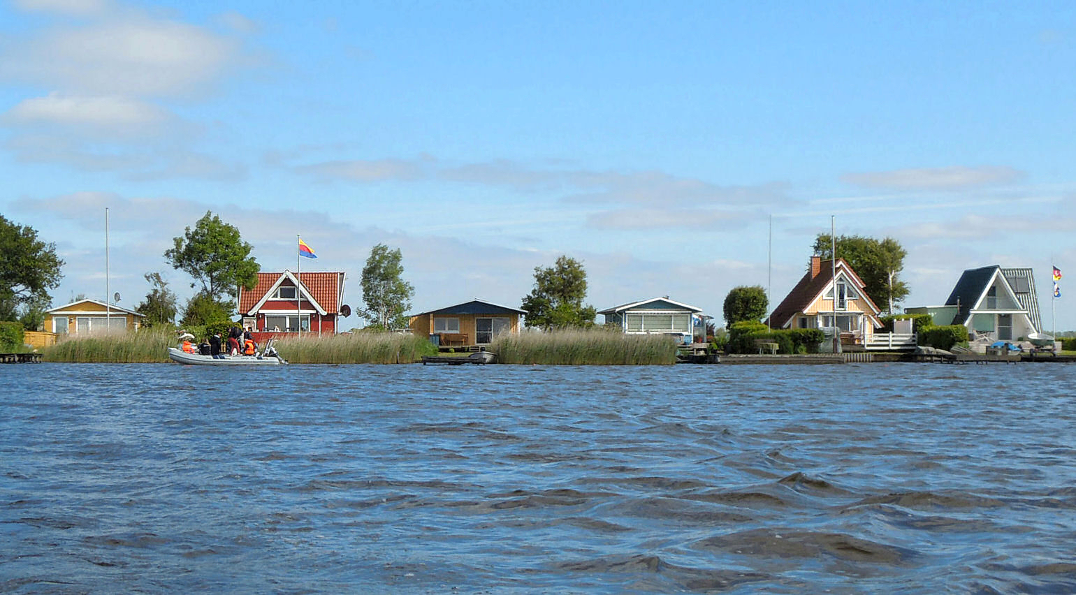 Meerbuden am nordöstlichen Ufer des Kleinen Meeres (Hieve)